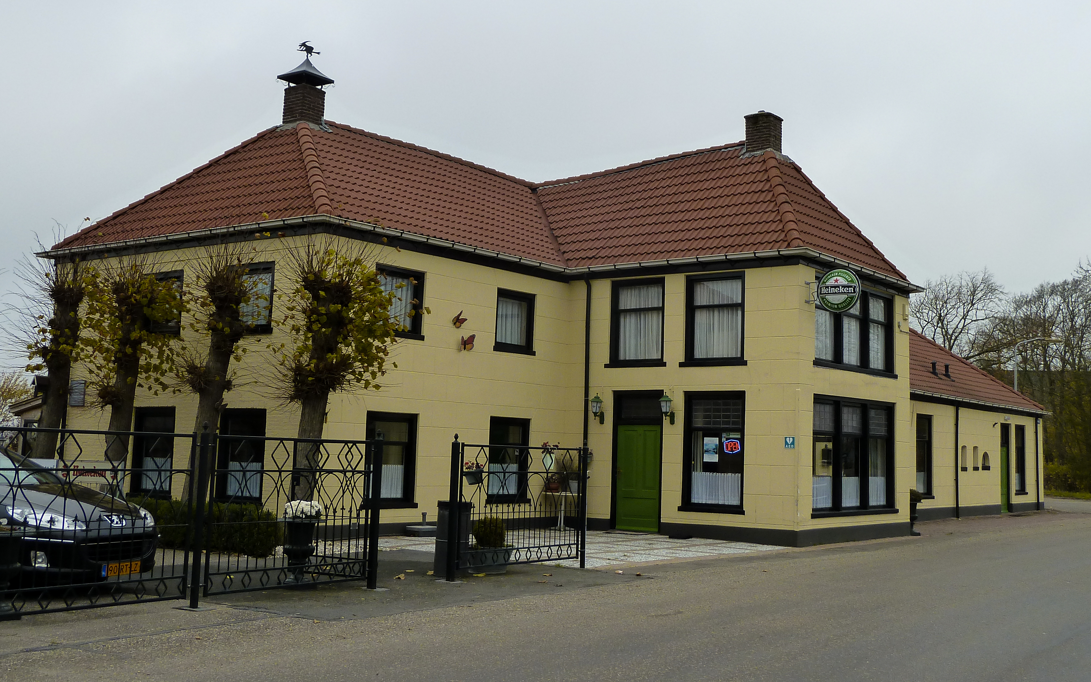 Café in Winneweer. Oudste huis. Eerste vermelding op kaart van Jeronimus Sweerts uit 1668 als 'Logys-plaets'. In de 18e eeuw was er een weeshuis gevestigd, maar later werd er weer een herberg gevestigd, dat tevens dienstdeed als rechthuis.